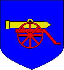 D'azur au canon d'or affûté de gueules